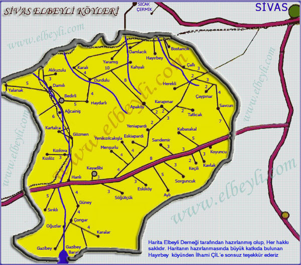 Harita Elbeyli Derneği Tarafından Hazırlanmıştır.